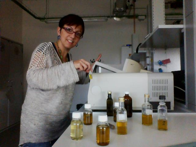 Valentina Domenici, assessore al Comune di Rosignano Marittima, ricercatrice scientifica, divulgatrice scientifica. Qui al lavoro presso il Dipartimento di Chimica e Chimica Industriale, a Pisa (analisi di oli di oliva)